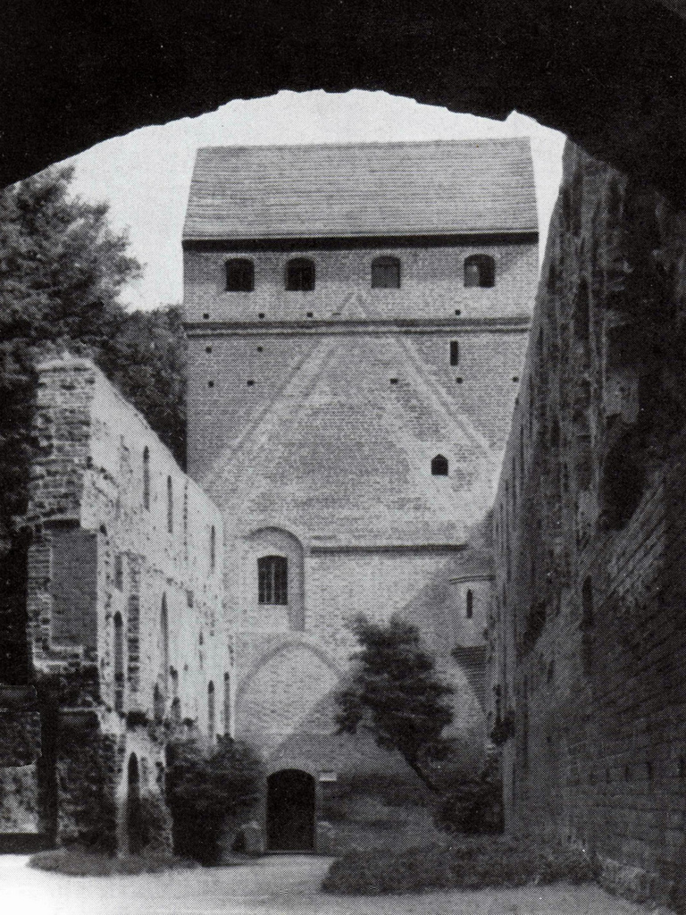 Die Burg Balga in den 30er Jahren